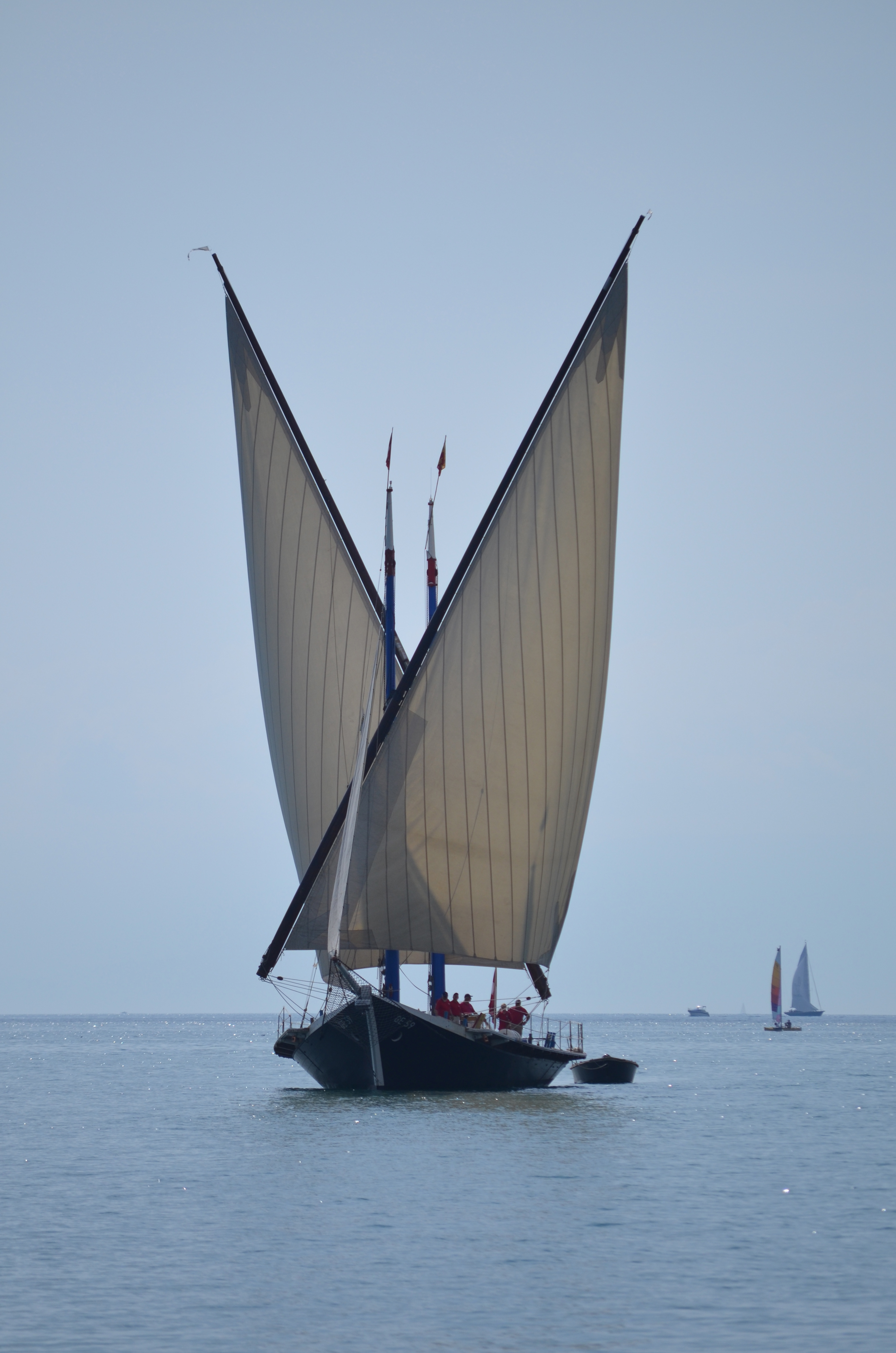 La Neptune - Vevey - 31 juillet 2014 - 00